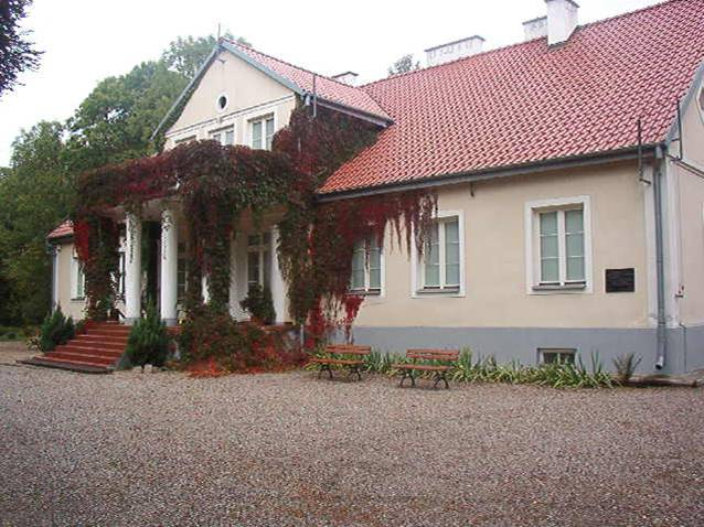 Gołotczyzna - dwór w zespole dworskim „Krzewna” w którym w 1909 roku Aleksandra z Sędzimirów Bąkowska utworzyła z własnych funduszy szkołę rolniczą dla dziewcząt wiejskich.